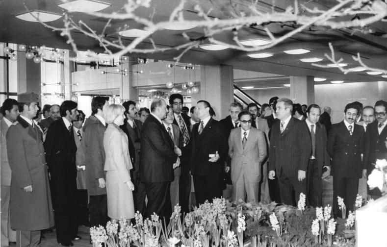 ADN-ZB Koard-8.1.78 Berlin: Irakische Delegation besuchte Palast der Republik - Die Staatsdelegation der Republik Irak machte sich am 8.1.78, dem zweiten Tag ihres offiziellen Besuchs in der DDR, mit dem Aufbau der Hauptstadt und Berliner Sehenswürdigkeiten bekannt. Die Besichtigungstour führte den Vizepräsiedenten , Taha Muhiyiddin Maarouf (vordere Reihe 2.v.l.), in den Palast der Republik. Während des Rundgangs erfuhren die Gäste, dass das Haus des Volkes seit seiner Fertigstellung mehr als 18 Millionen Besucher zählte. Taha Muhiyiddin Maarouf wurde von Günther Kleiber, Kandidat des Politbüros des ZK der SED (5.v.r.), begleitet.